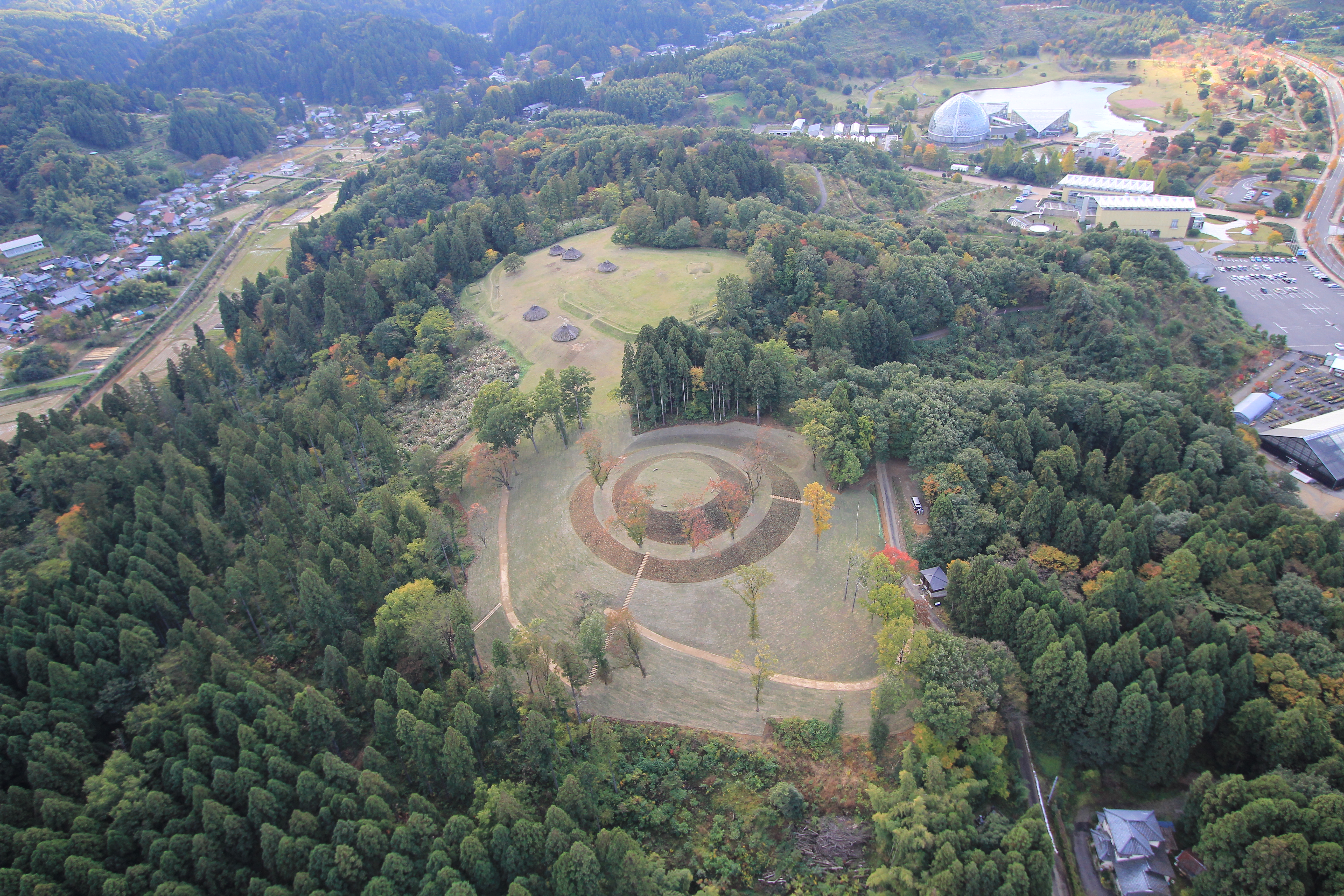 史跡古津八幡山遺跡 歴史の広場 新潟市秋葉区 2014年10月29日撮影